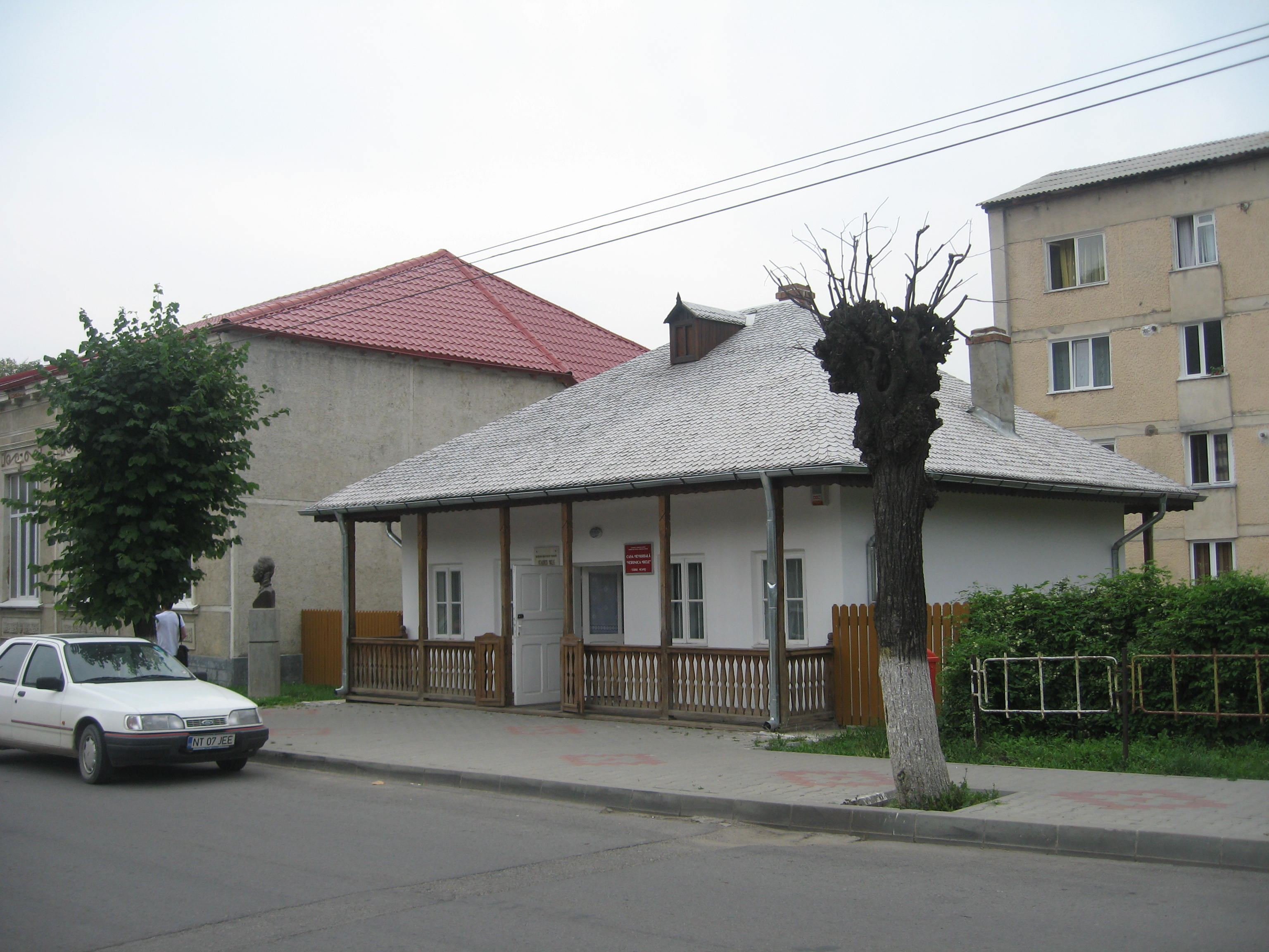 Casa memoriala Veronica Micle din Târgu Neamț